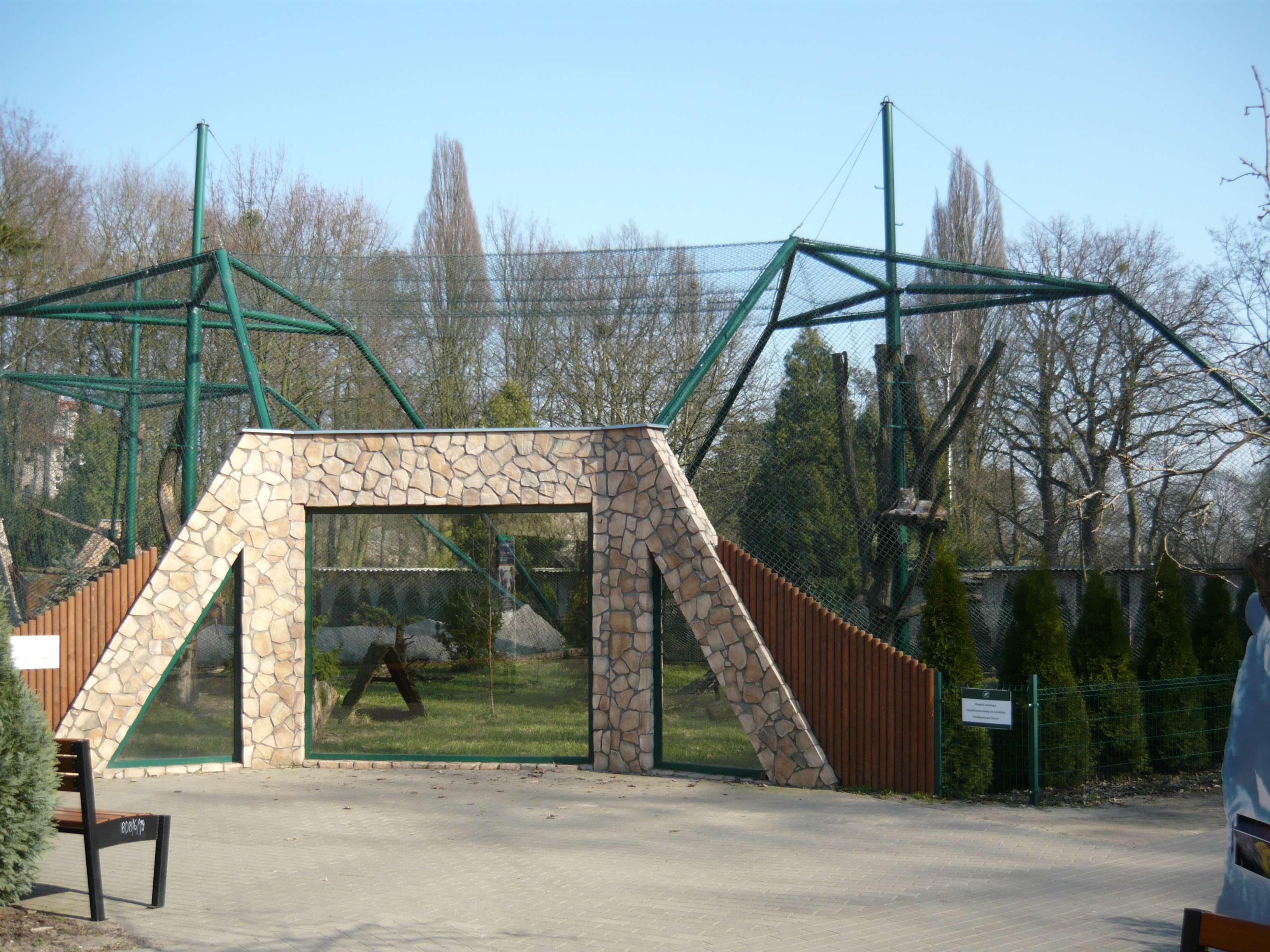 wybieg zwierząt kotowatych 2015 rok